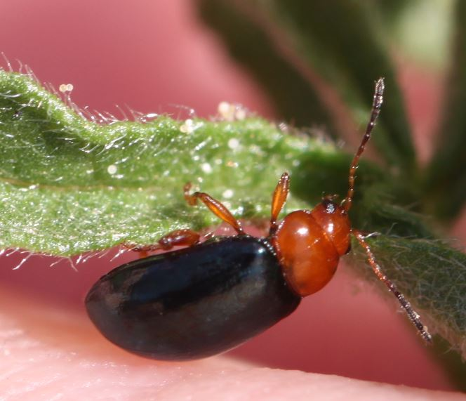 Malven-Erdfloh (Podagrica fuscicornis) an Rosenmalve (Malva alcea)), am 3. August 2018 in Walldorf/Baden